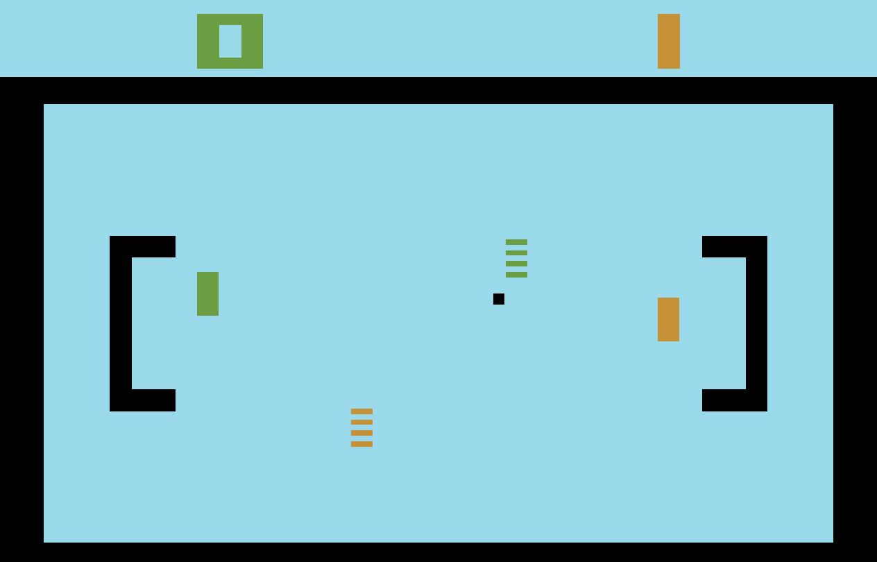 Spielfeld von Hockey mit vier Spielern in Video Olympics